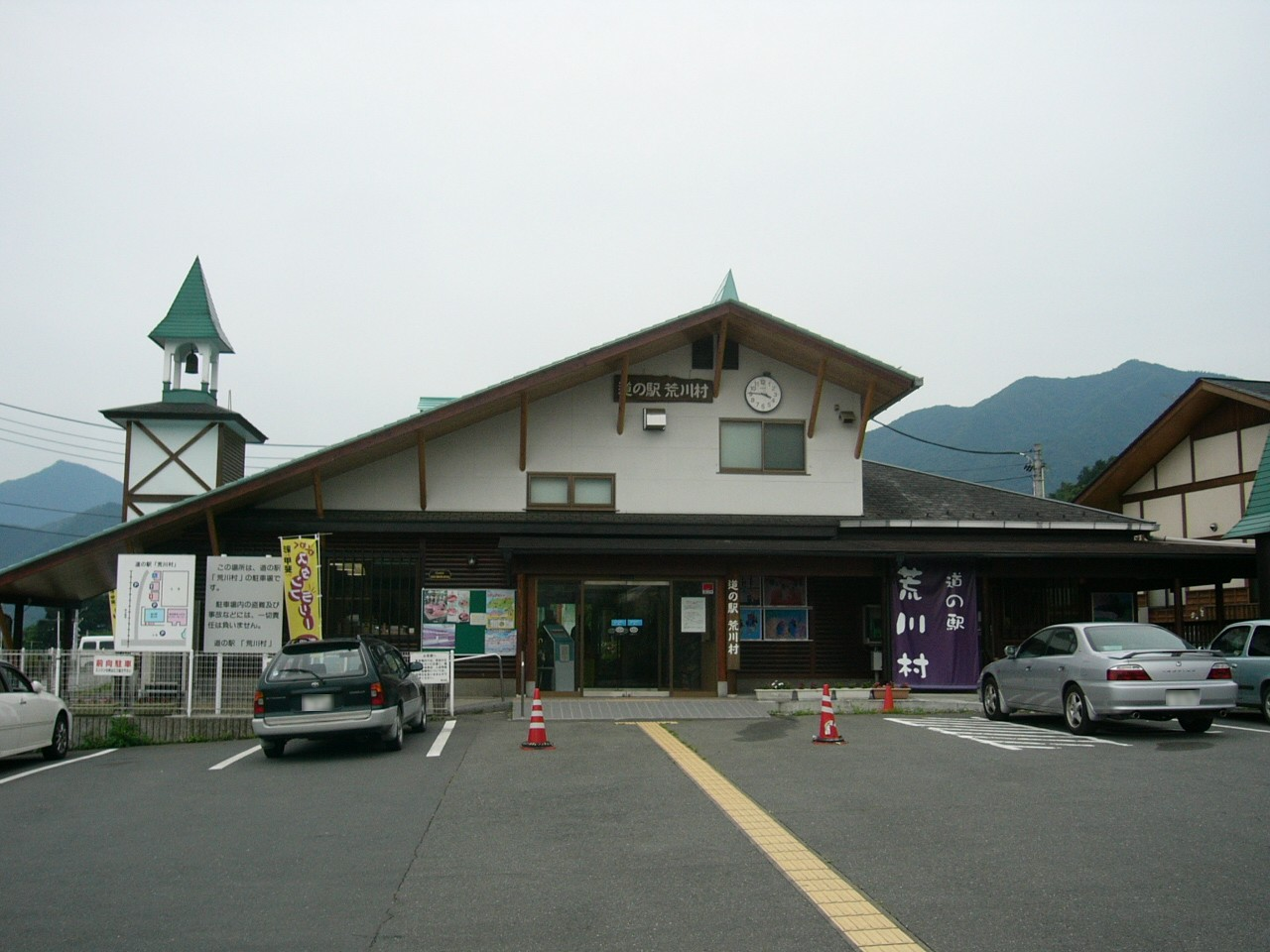 Michinoeki Arakawamura (Saitama)(道の駅荒川村)